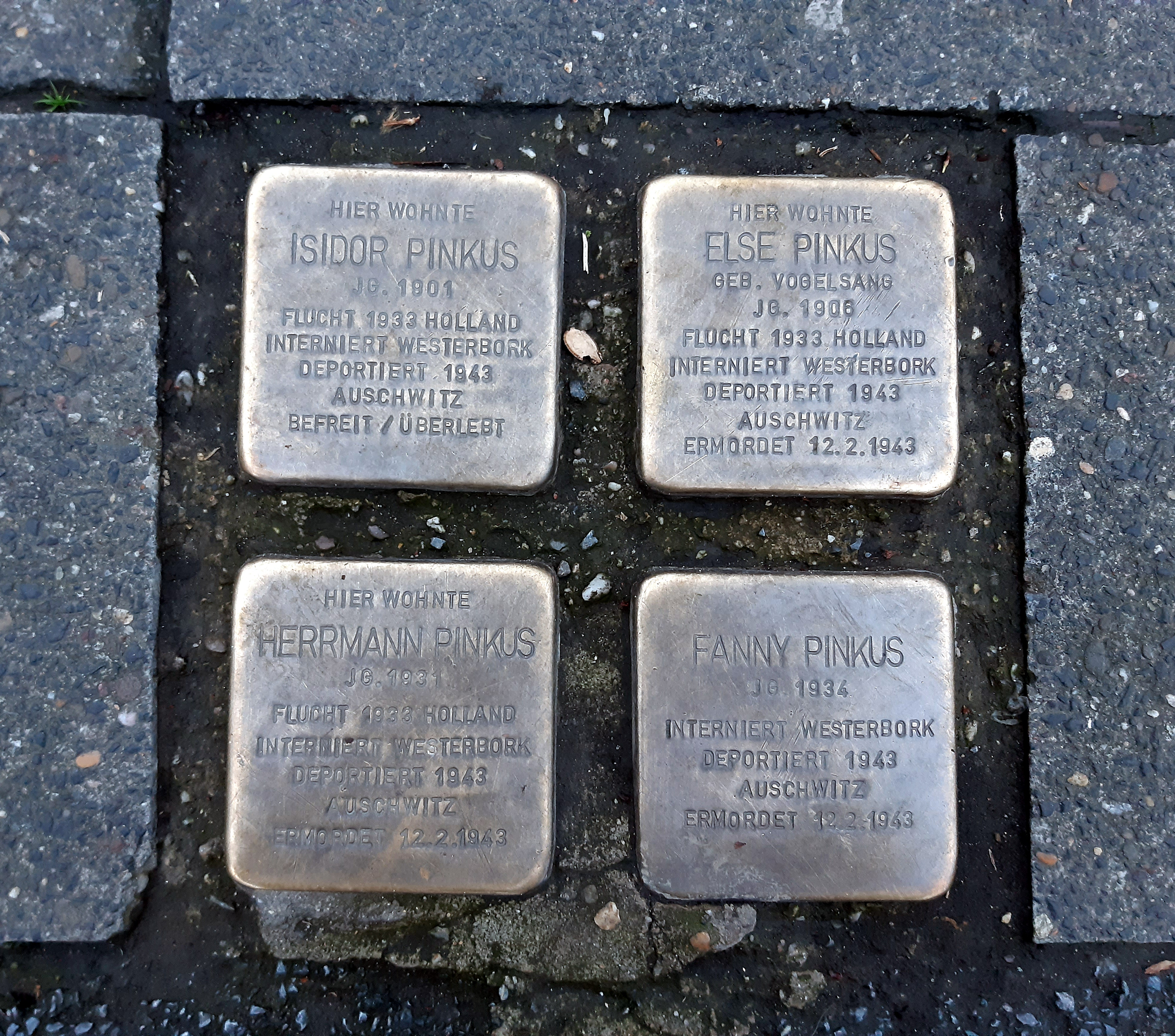 Stolpersteine Heroldstraße/Ecke Bornstraße in Dortmund